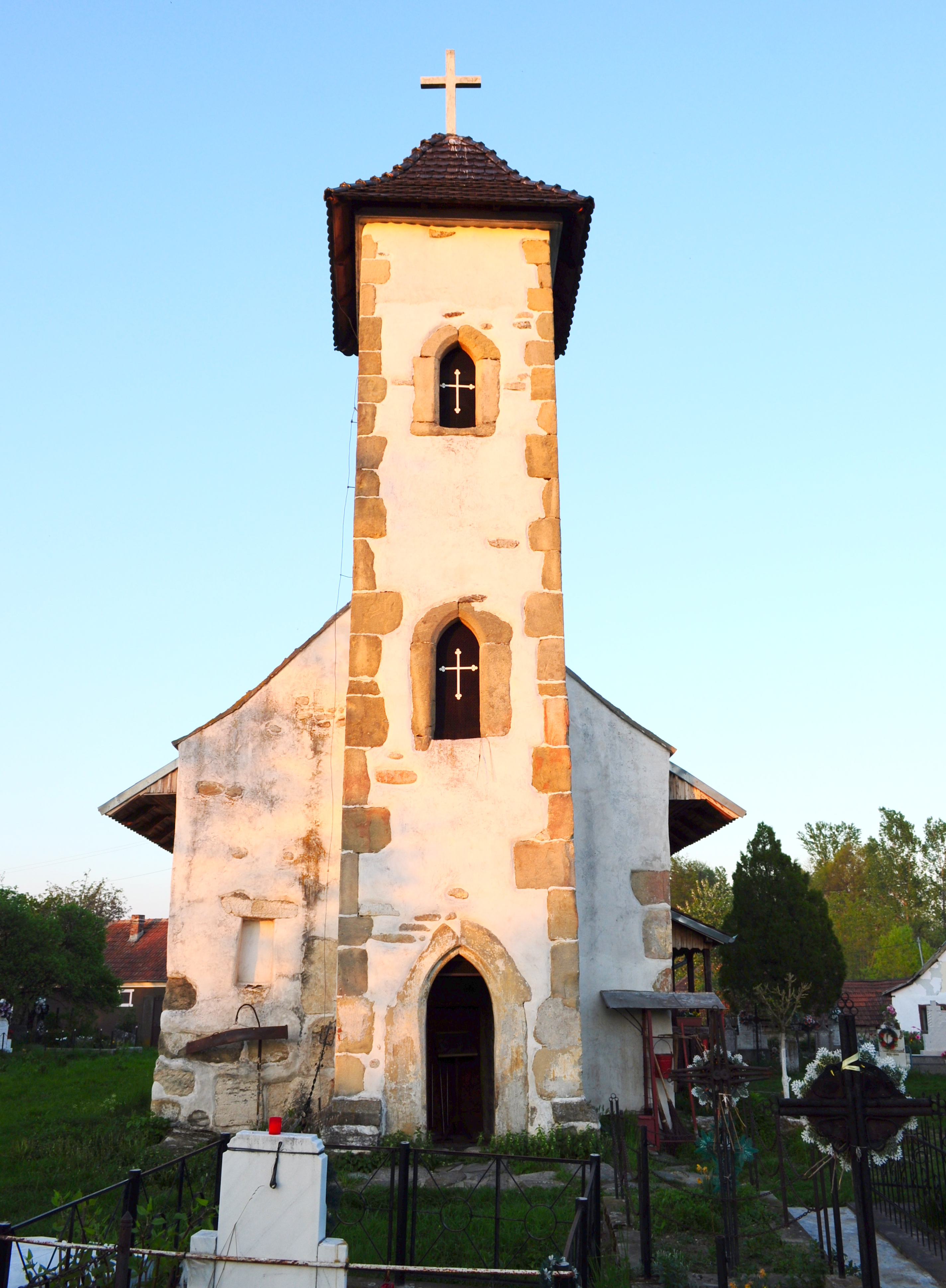 Biserica "Pogorârea Sfântului Duh", sat OSTROV; comuna RÂU DE MORI 01